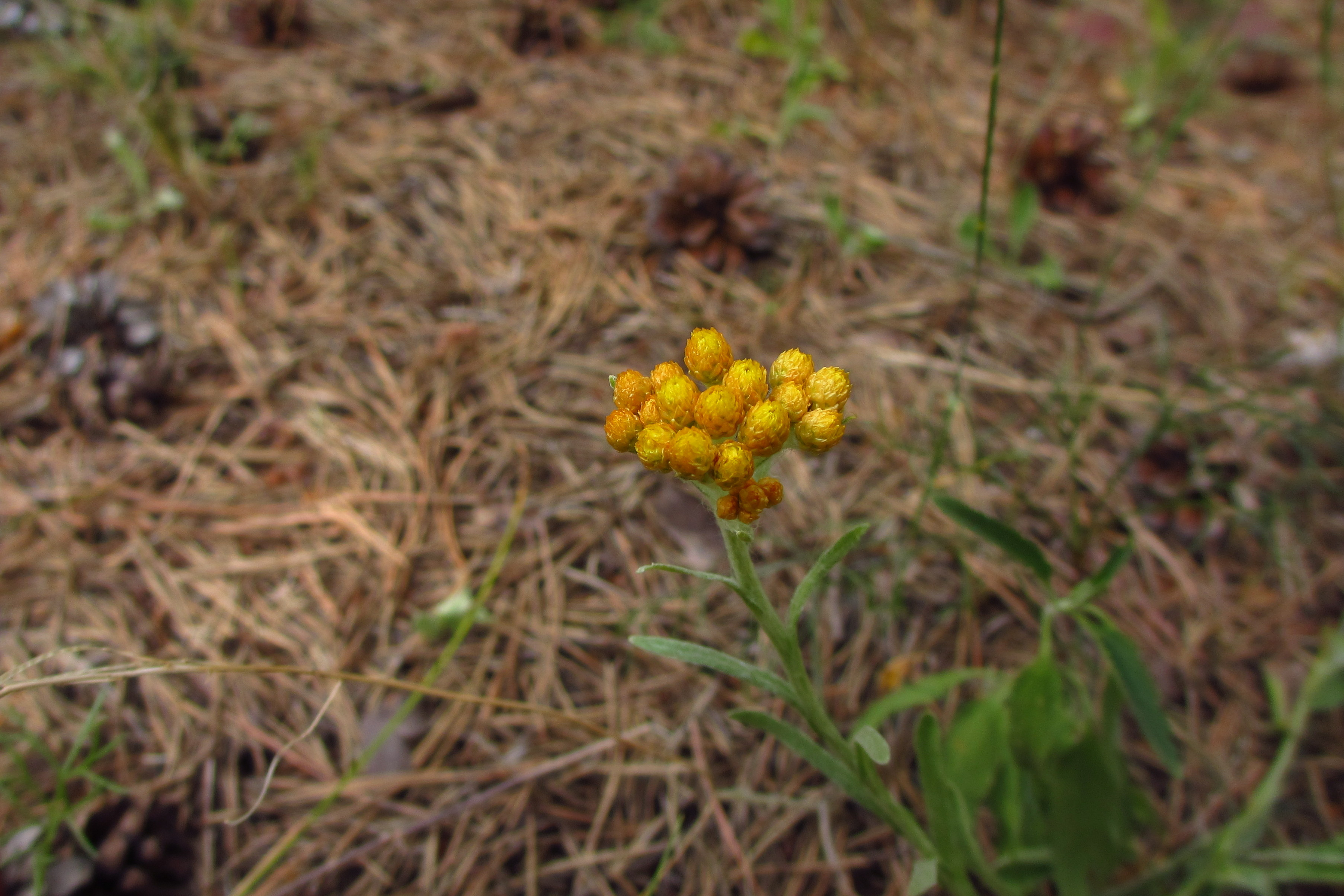 Harilik käokuld (Helichrysum arenarium) Pangodi mägedes Pangodi MKA-l